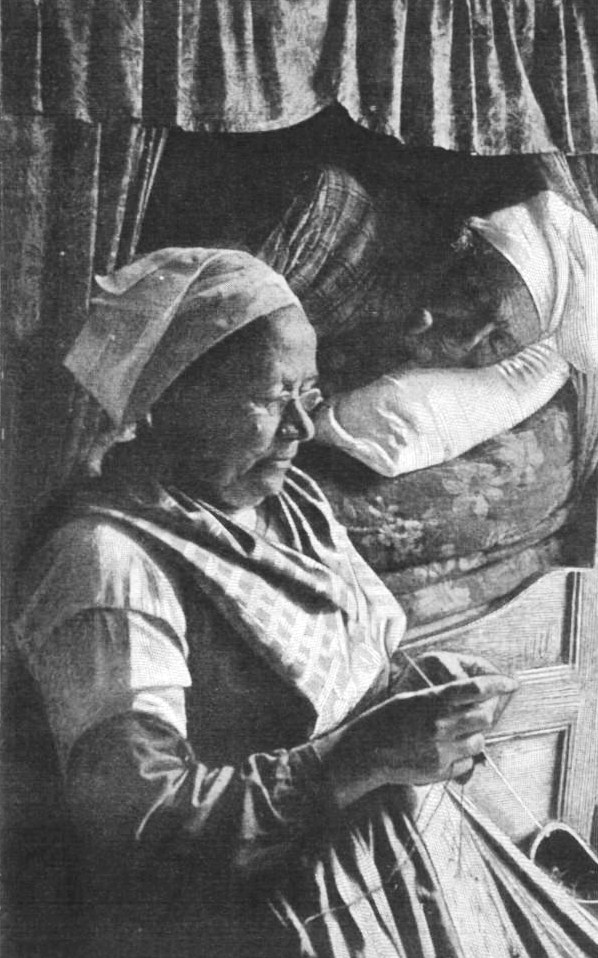 Vieux couple de Pleyben et son lit clos